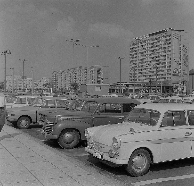 Original image description from the Deutsche FotothekDresden. Blick entlang der Leningrader Straße, Nord-Süd-Magistrale